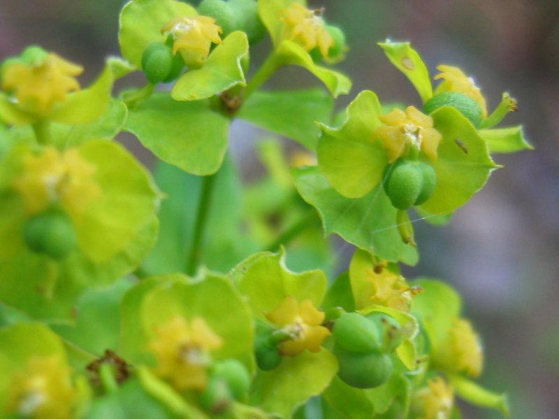 Detailansicht der Esels-Wolfsmilch Euphorbia esula